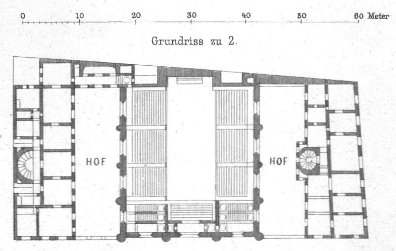 Synagoge Tempelgasse in Wien (1858-1938), Architekt: Ludwig Förster; Grundriss